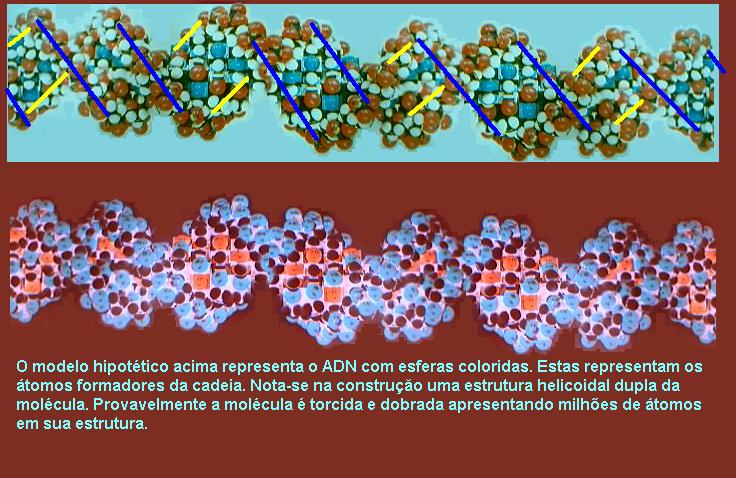 Modelo helicoidal da estrutura do ADN representado por esferas. by Angeloleithold 1979